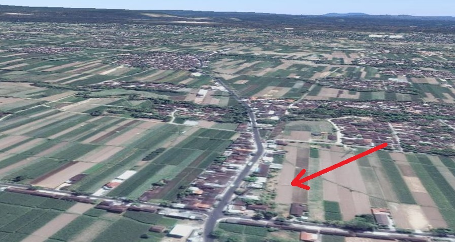 Foto Perkampungan Prapatan diambil dari google map